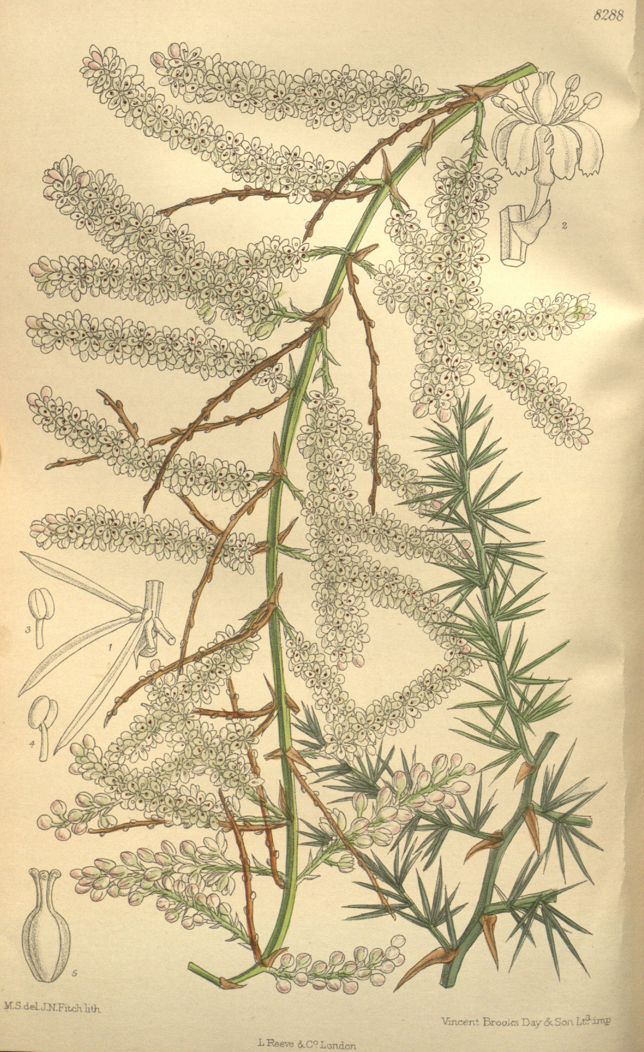 Asparagus tetragonus (= Asparagus racemosus), Asparagaceae